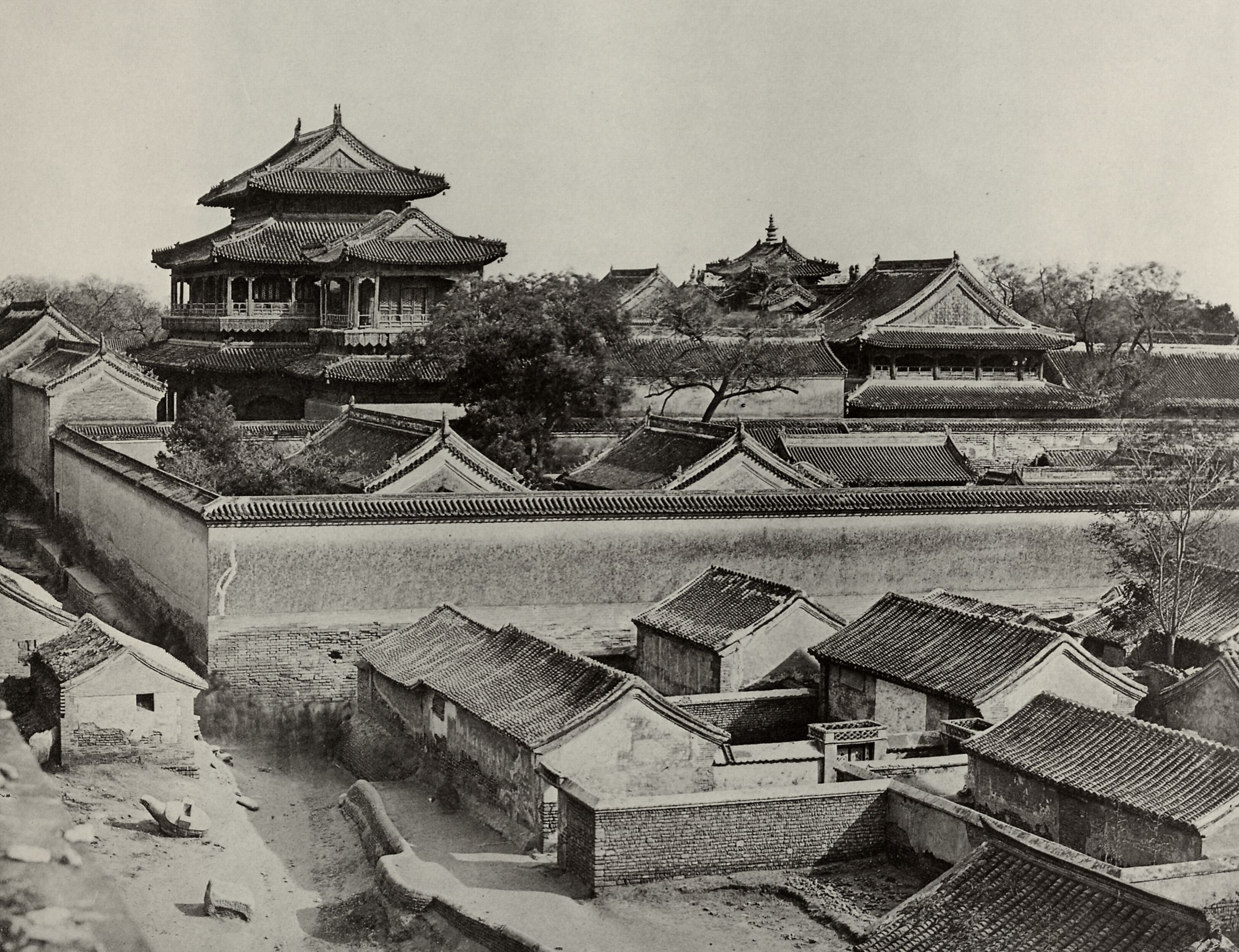 Beato, Felice A.: Ansicht des Confuzianischen Tempels vom An-ting Tor aus gesehen, Peking